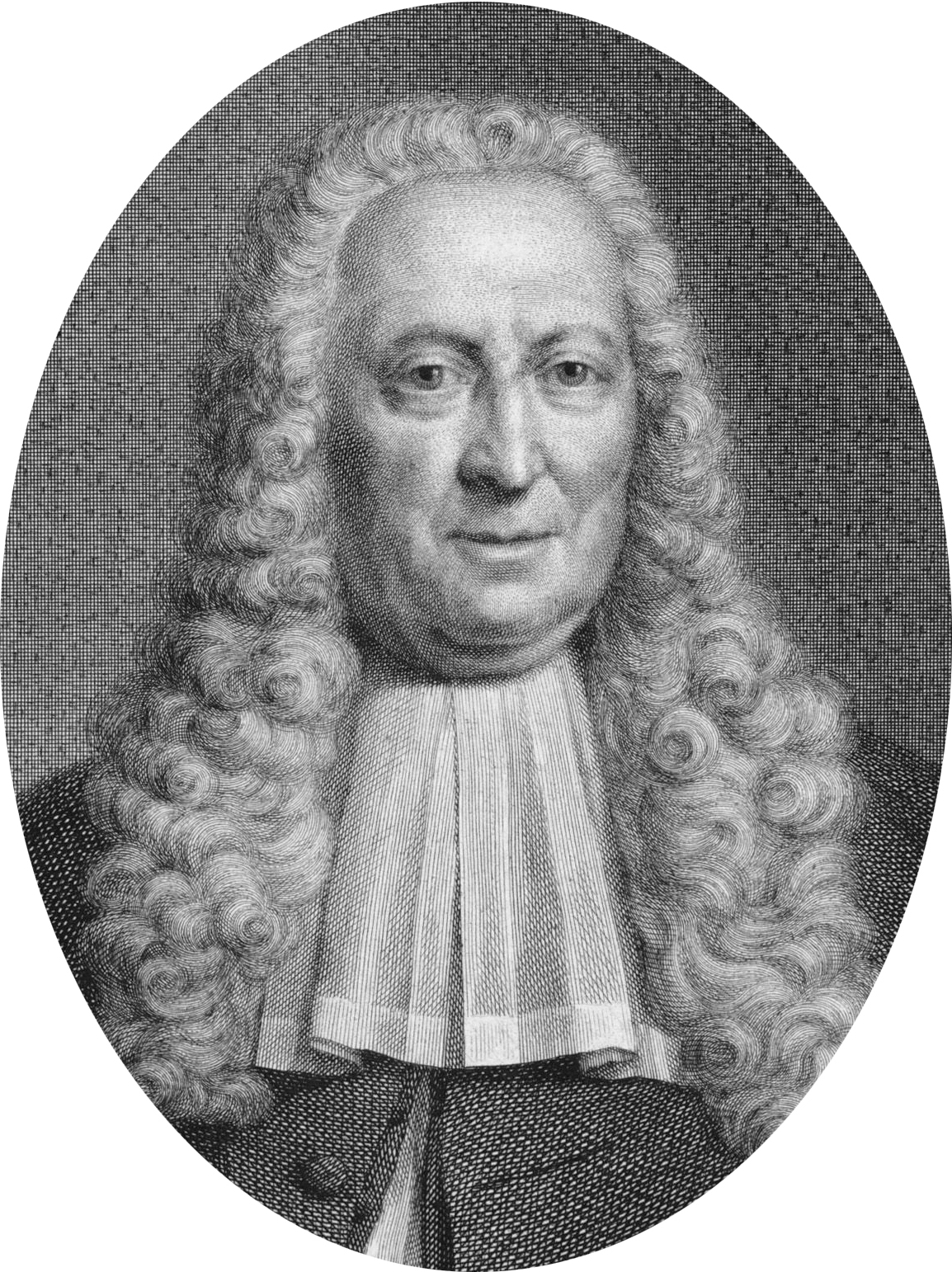 Gerrit Hooft (02-05-1684 / 24-11-1767) Burgemeester van Amsterdam in 1758